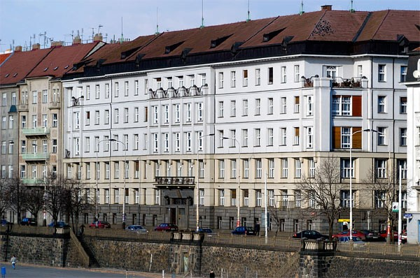 Budova ústředí ÚZSVM, Rašínovo nábřeží 42, Praha 2